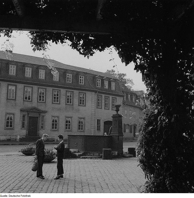 Original image description from the Deutsche Fotothek Weimar. Goethes Wohnhaus am Frauenplan